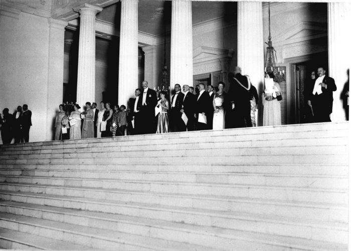 Foto. Aangeboden aan Zijne Excellentie den Gouverneur-Generaal van Nederlandsch-Indië ter gelegenheid van de opening der Rechts Hoogeschool te Batavia. Opening van de Rechtshogeschool op 28 oktober 1924 te Batavia. De aankomst van Z.E. de G.G.Mr. D.Fock met gasten bij het defilé van den optocht